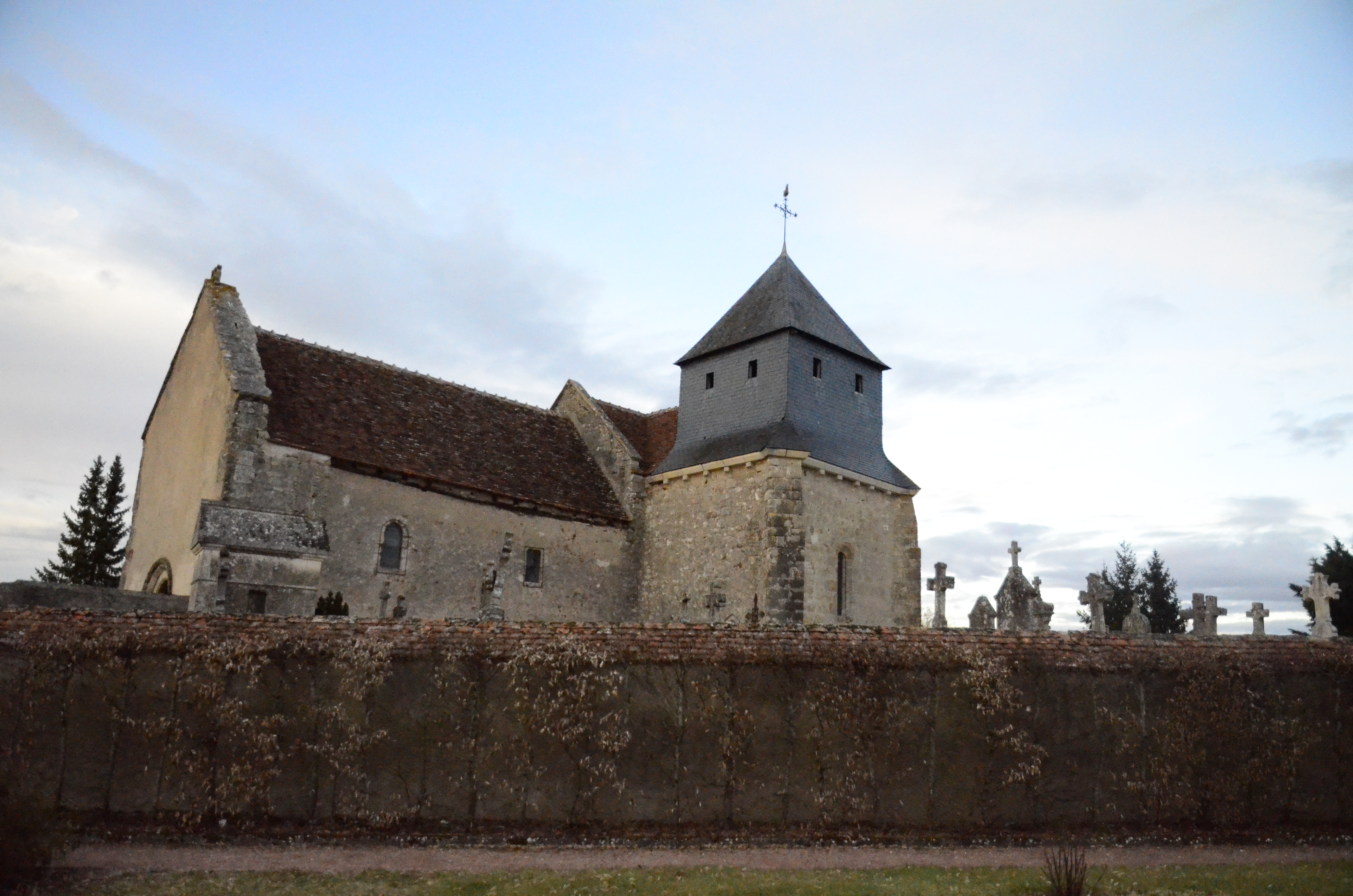 Vue générale de l'édifice.